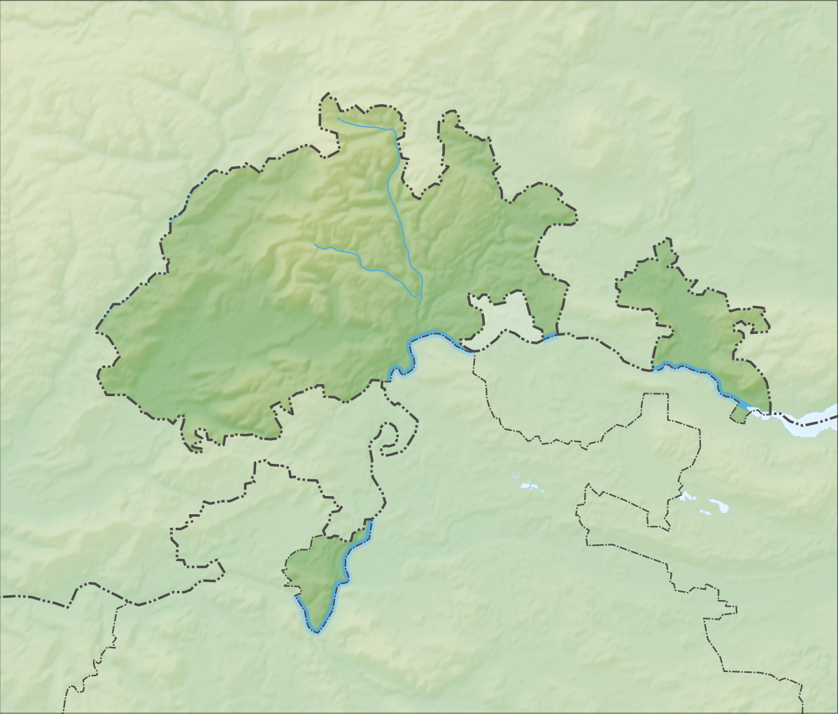 Reliefkarte des Kantons Schaffhausen Topographischer Hintergrund: NASA Shuttle Radar Topography Mission (public domain). SRTM3 v.2.